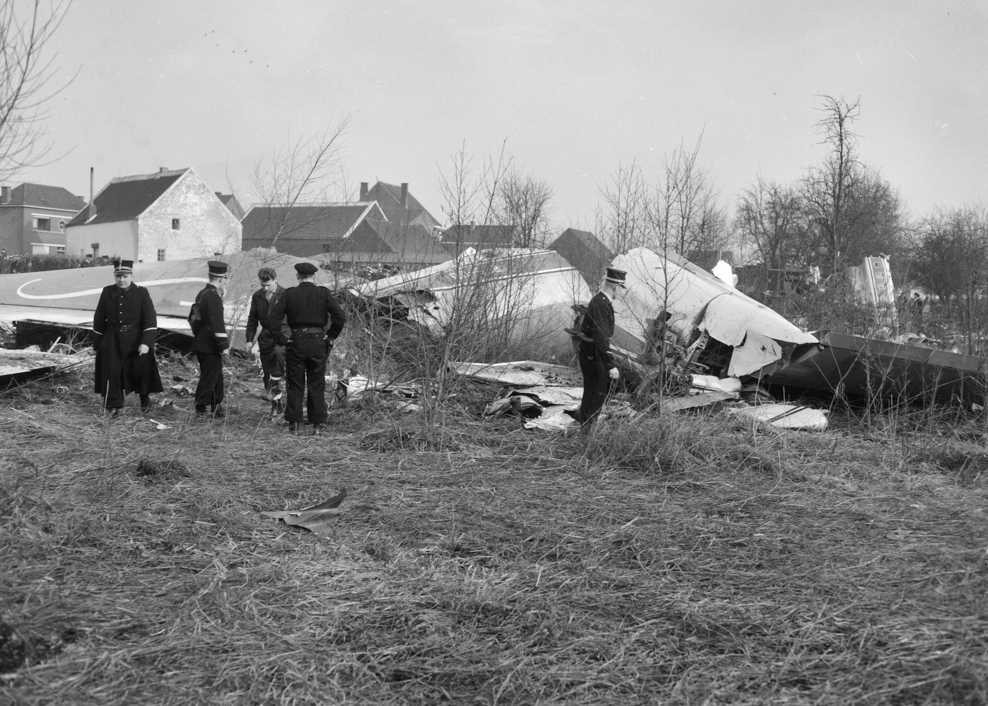 Collectie / Archief : Fotocollectie Anefo Reportage / Serie : [ onbekend ] Beschrijving : Ramp met Sabenavliegtuig bij Brussel, overzicht van de wrakstukken Datum : 15 februari 1961 Locatie : Brussel Trefwoorden : Rampen, overzichten Instellingsnaam : Sabena Fotograaf : Behrens, Herbert / Anefo Auteursrechthebbende : Nationaal Archief Materiaalsoort : Negatief (zwart/wit) Nummer archiefinventaris : bekijk toegang 2.24.01.04 Bestanddeelnummer : 912-1030